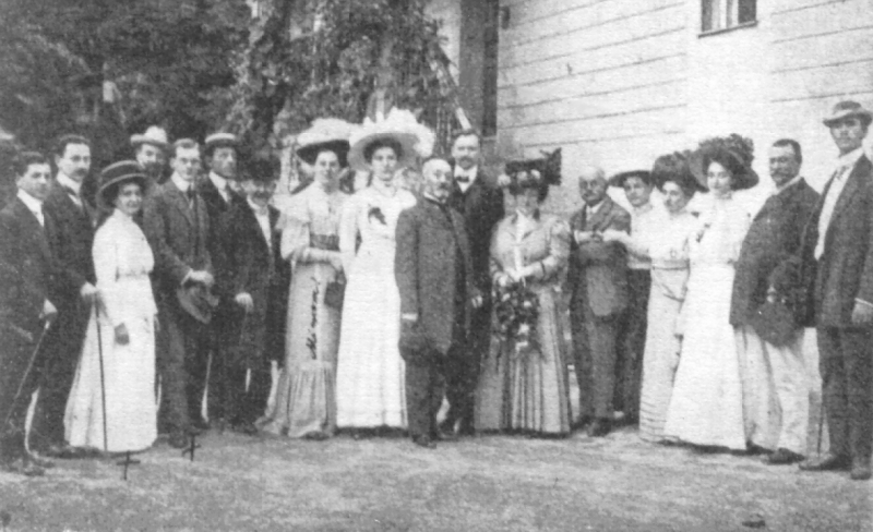 Ludwik L. Zamenhof mit Familie und Esperanto-Pionieren in Bad Reinerz, 1909. Mitte: Ludwik L. Zamenhof, rechts neben ihm seine Frau Klara. 3.v.l.: Tochter Sofia, 5.v.l.: Sohn Adam